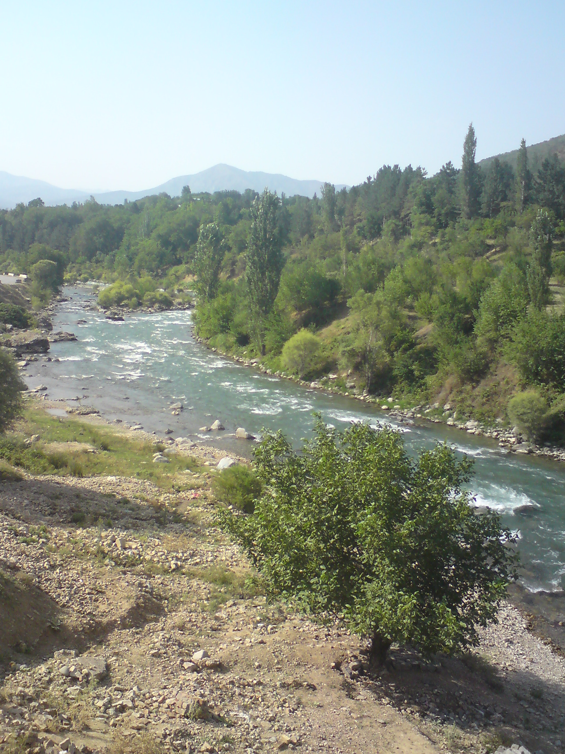 Река Угам выше зоны отдыха "Узбекнефтегаз", Ташкентский вилоят, Бостанлыкский туман, выше посёлка Хумсан